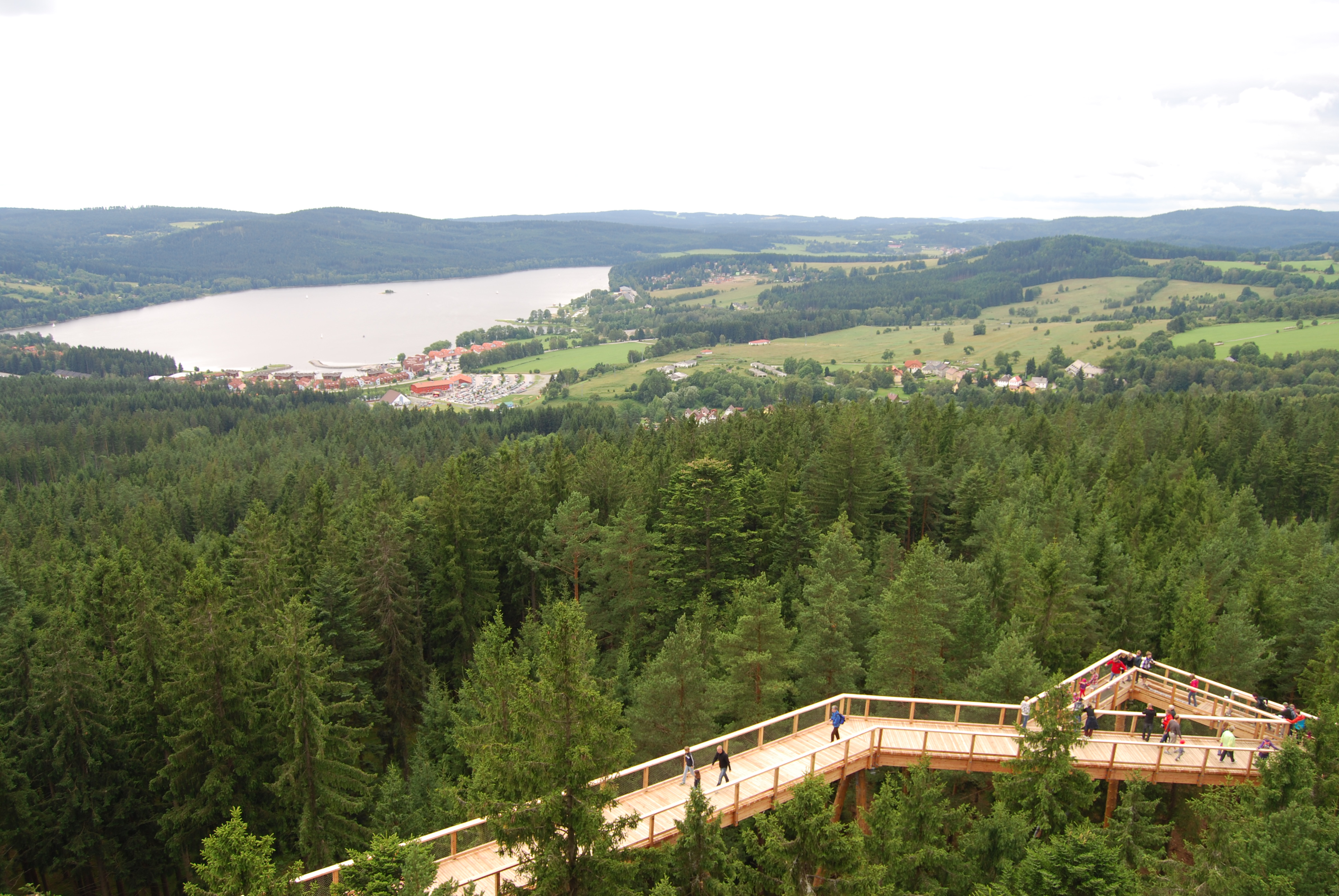 Pohled z vyhlídkové věže na část 675 metrů dlouhé stezky. Stezka korunami stromů. Lipno nad Vltavou. Okres Český Krumlov. Česká republika.